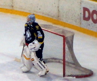 Hokejový brankár Andrej Vasijevic počas pôsobenia v MsHK Žilina